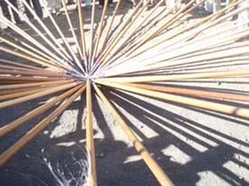 foto colectiva de garrotes usados en el salto del pastor canario.